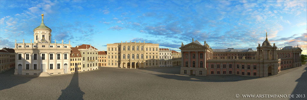 Virtuelle Rekonstruktion des Potsdamer Alten Marktes mit Altem Rathaus, Palast Barberini und Stadtschloss um 1850